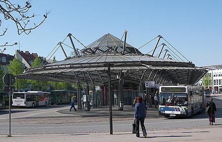 in westlicher Richtung